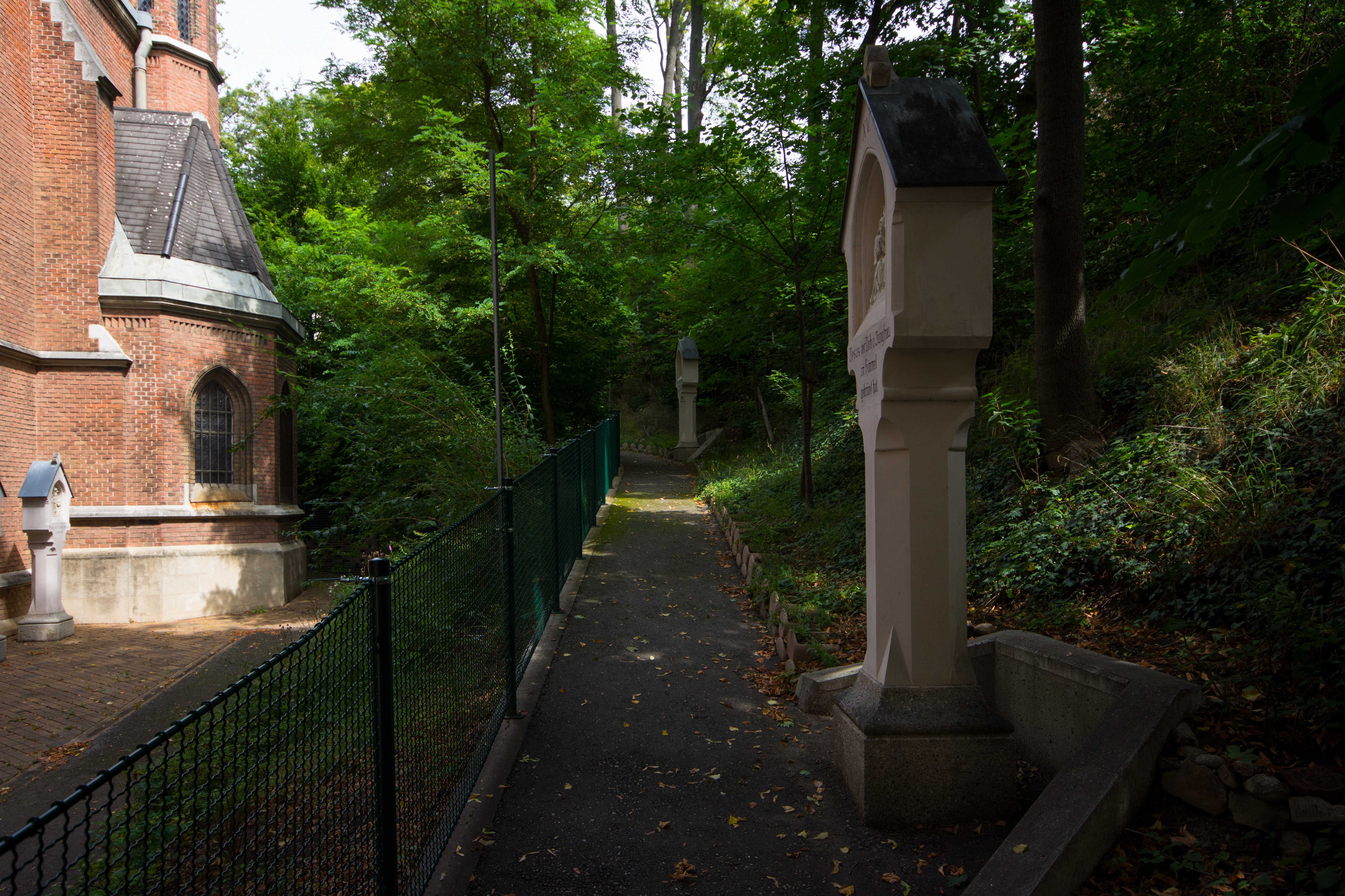 Östlicher Teil des Rosenkranzweges bei der Pfarre Weinhaus